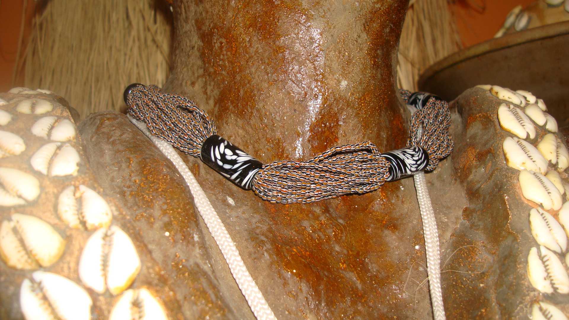 O Kelê é uma aliança que tem a finalidade de unir o sagrado com o iniciado